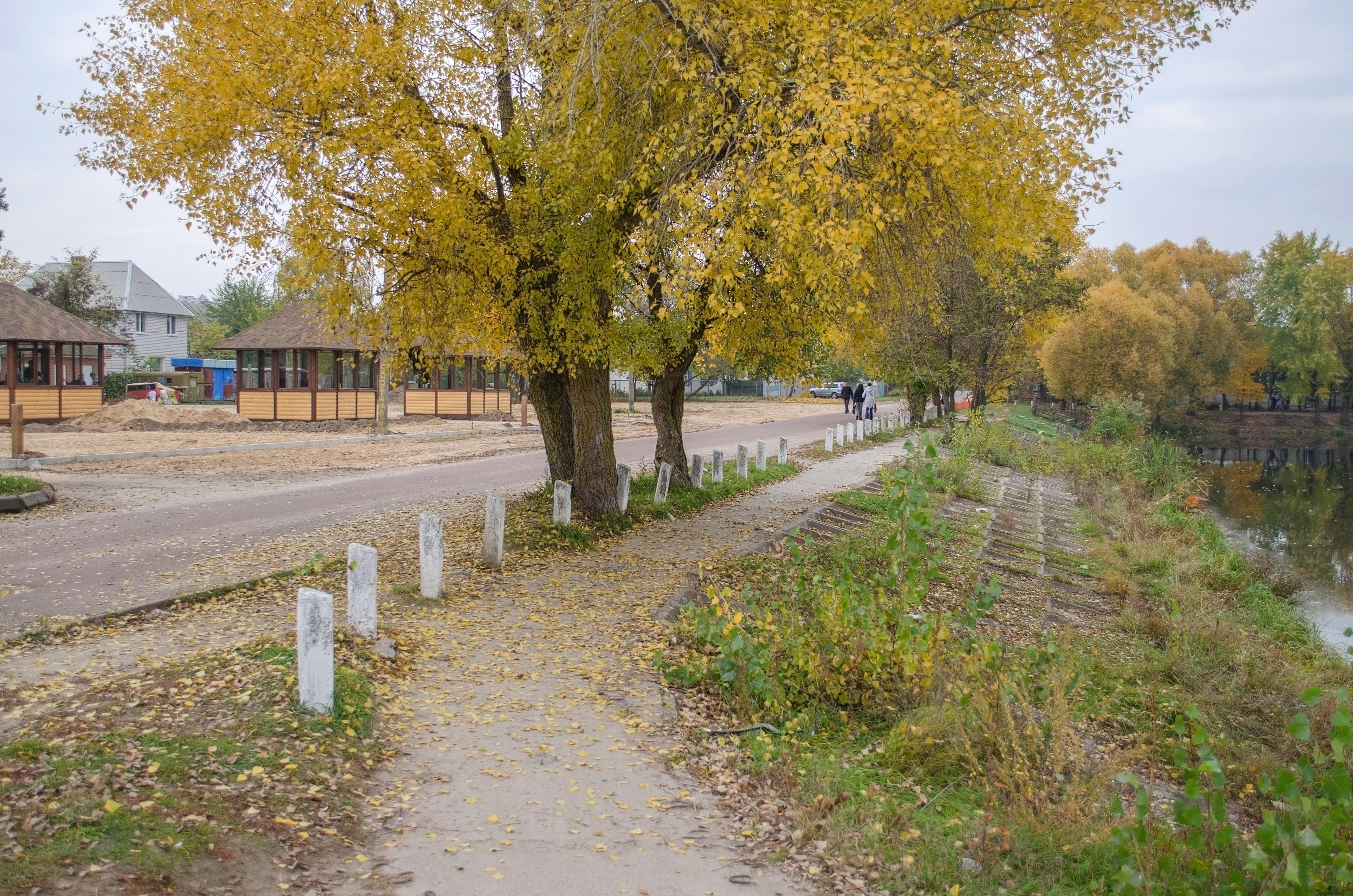 Ялівщина, м. Чернігів, північна околиця